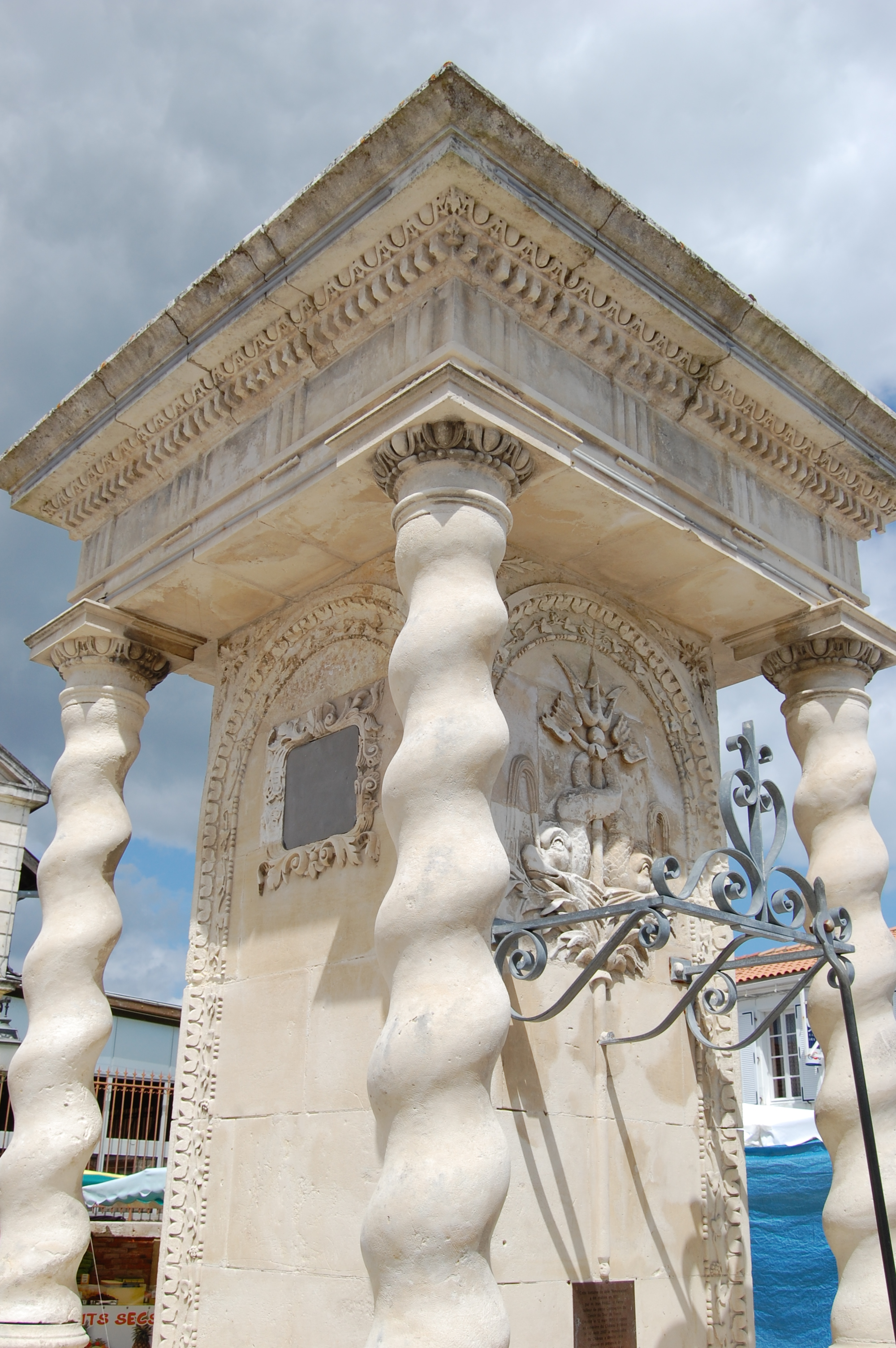 2009-07_Oleron_185